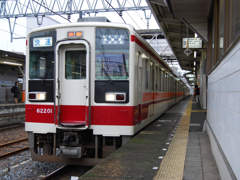 会津鉄道6050系200番台電車62201編成（2008-10-1・春日部にて撮影）